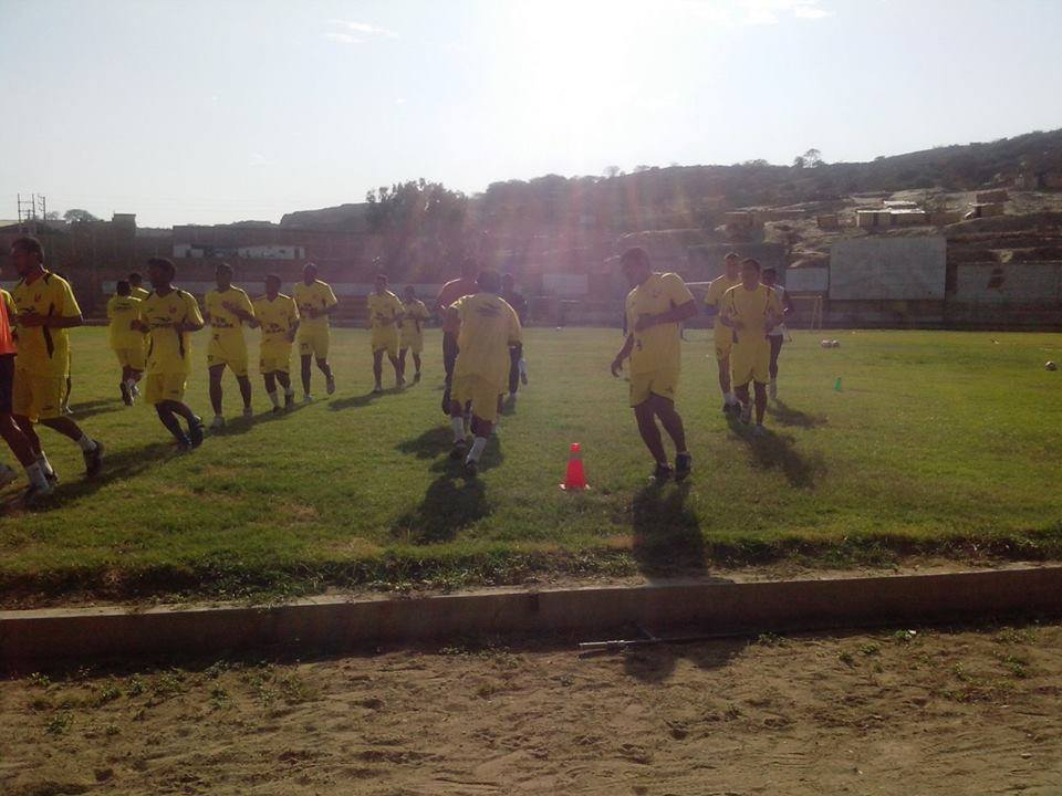 pre temporada